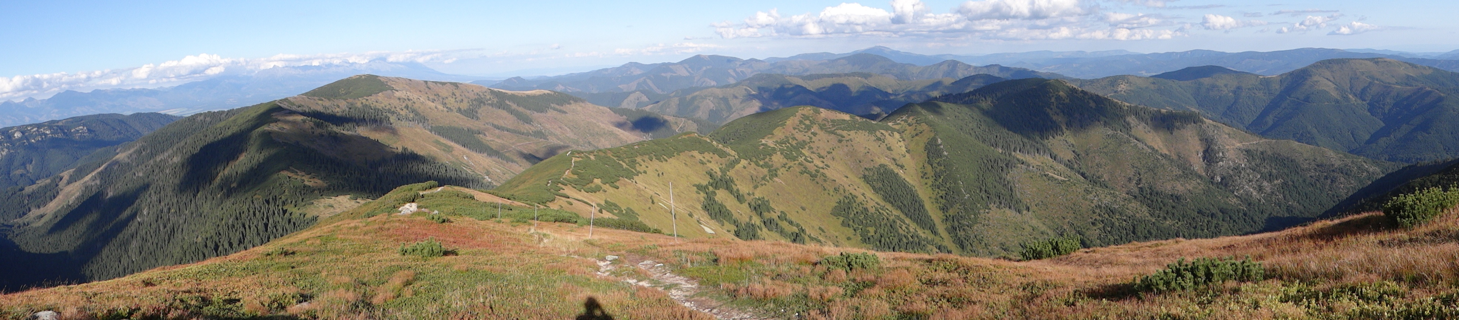 View from Králička